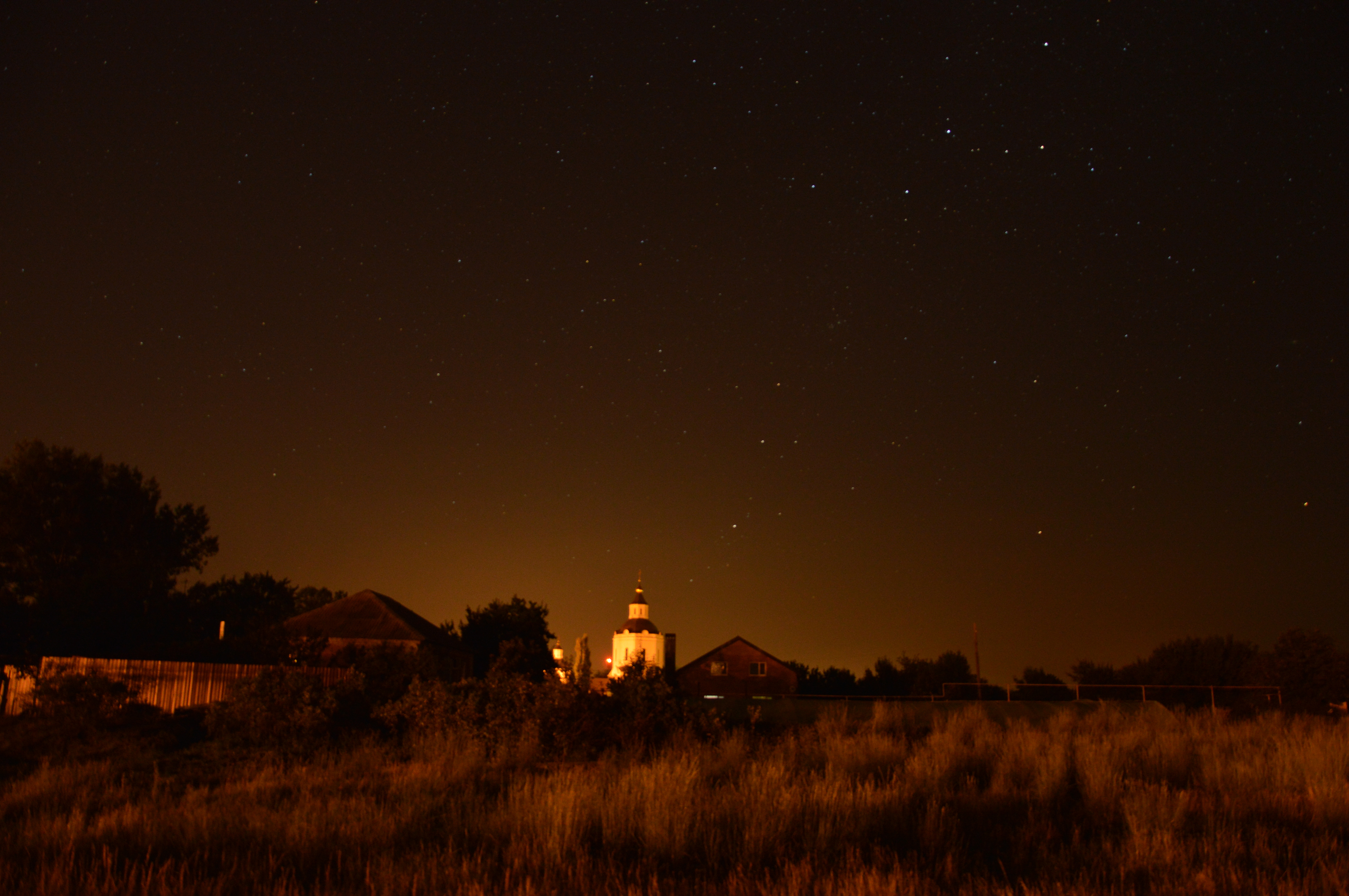 Ratna Church under the starry sky.